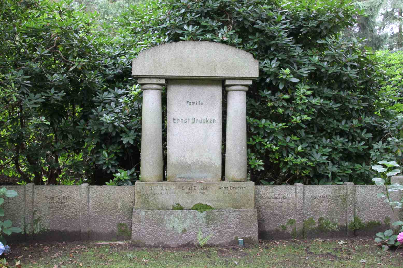 Ernst Drucker (* 23. Oktober 1855 in Hamburg; † 19. Mai 1918 ebenda[1]) war ein deutscher Schauspieler und Theaterbesitzer.